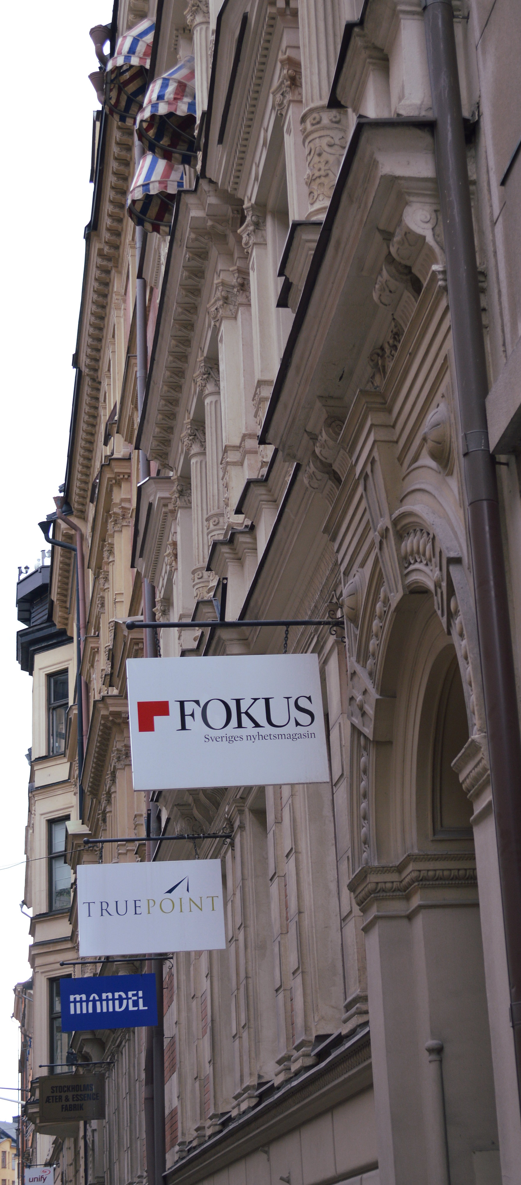 Skylten utanför tidskriften Fokus redaktion på Wallingatan i Stockholm, Sverige.